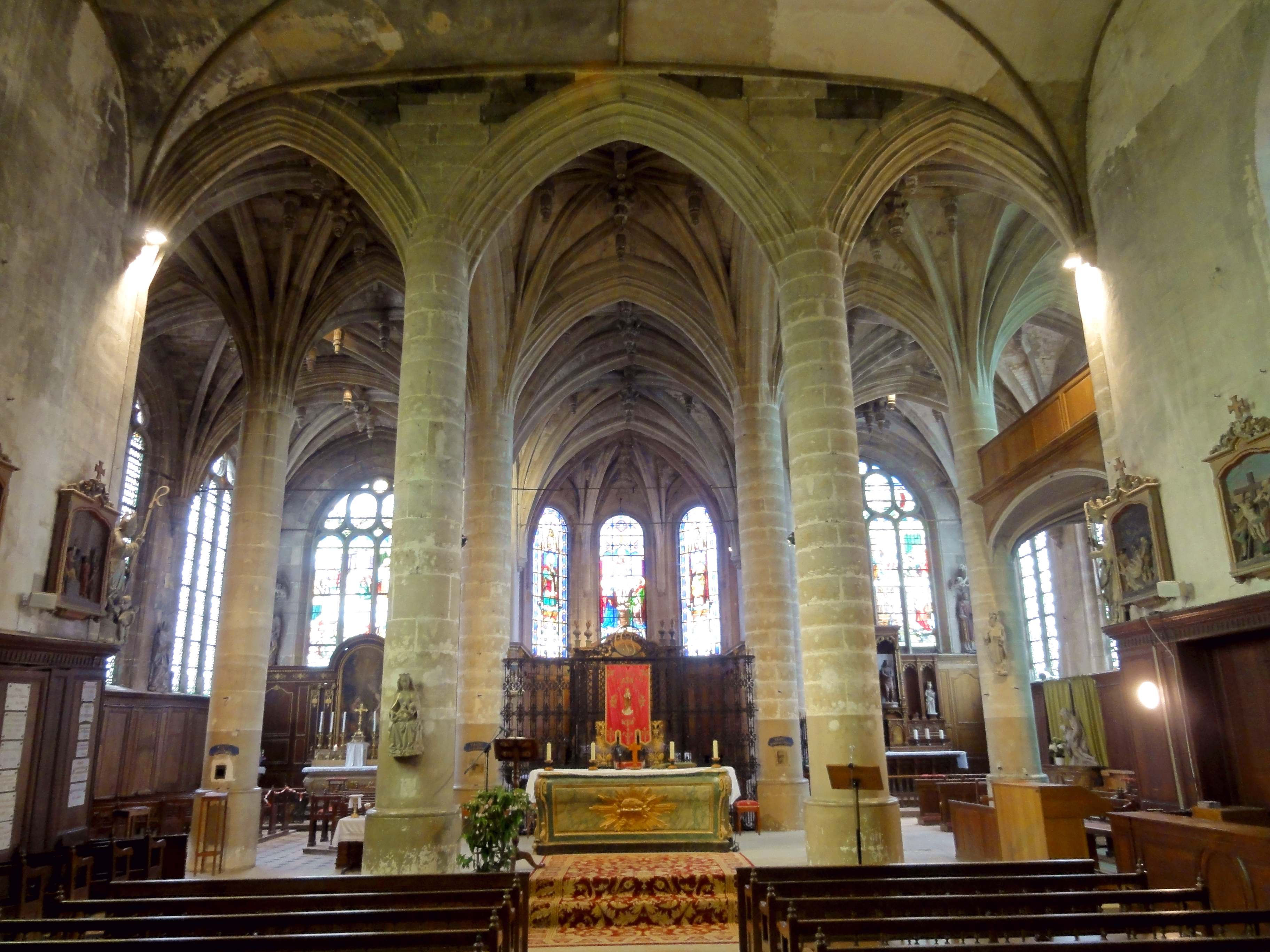 Intérieur de l'église (voir titre).